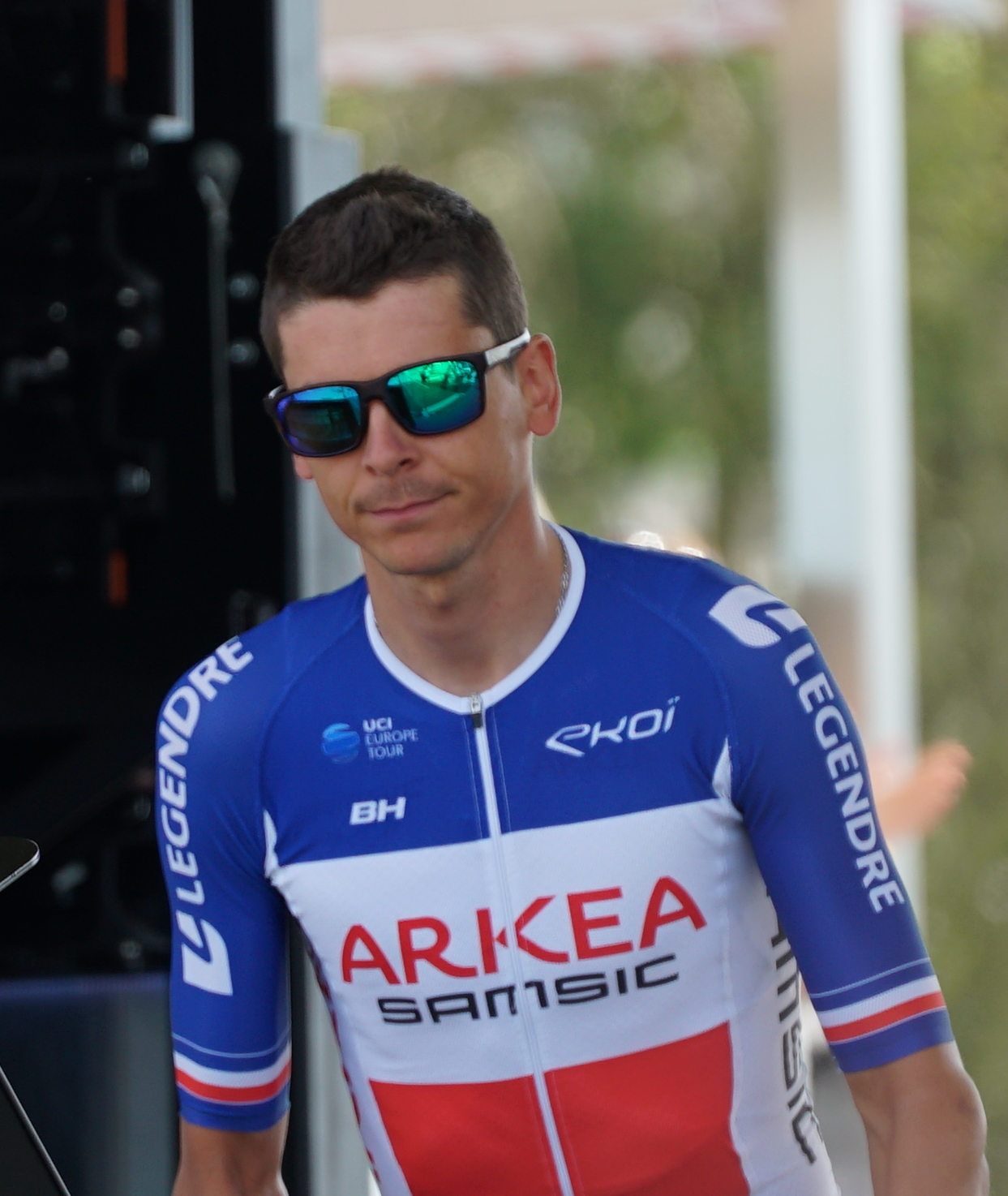 avant le départ de l'étape à Reims.